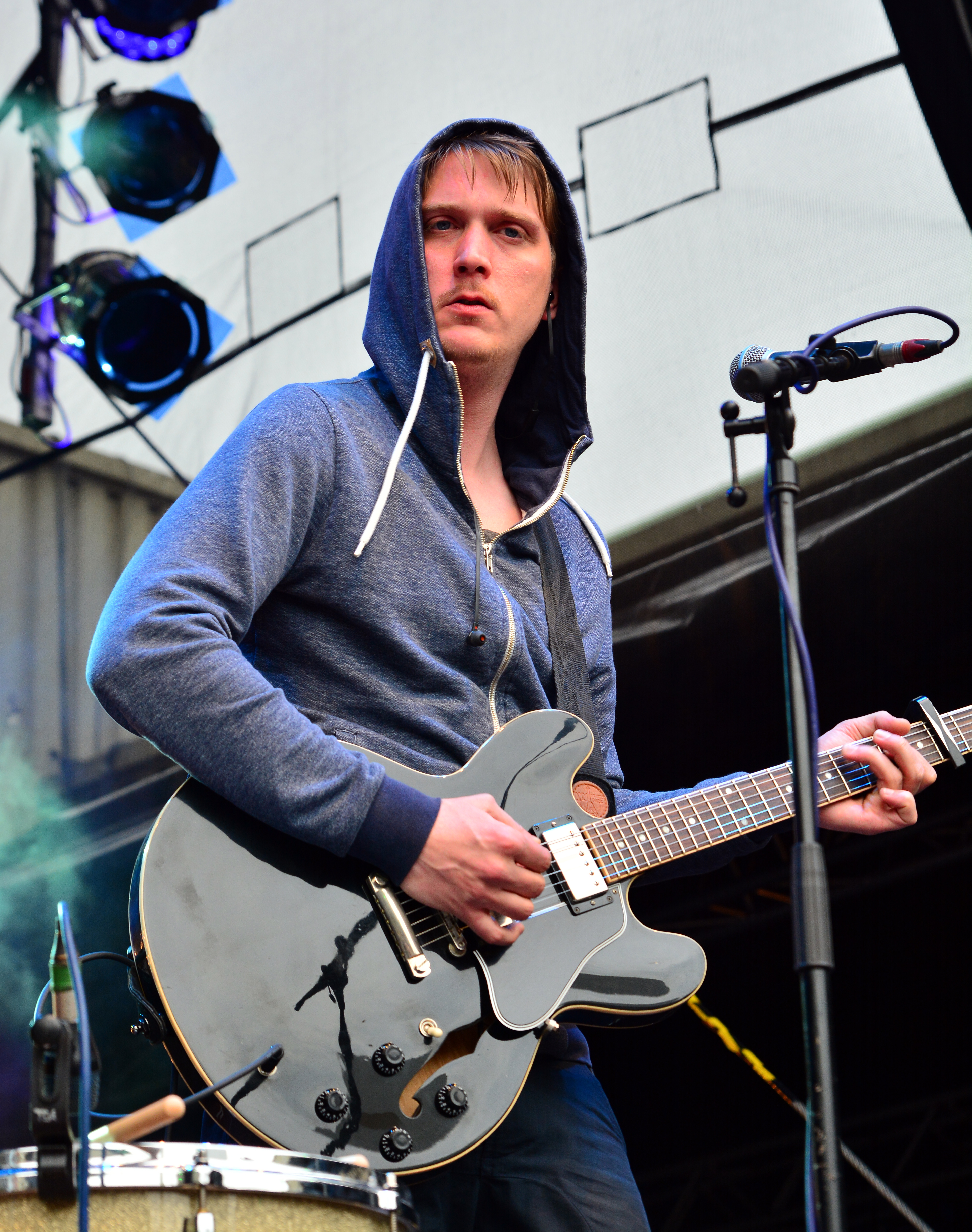 Juli beim „Holsten Brauereifest 2015“ in Hamburg